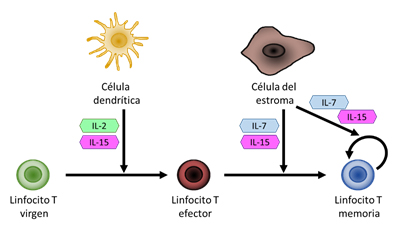 Citocinas necesarias para la generación de linfocitos T de memoria